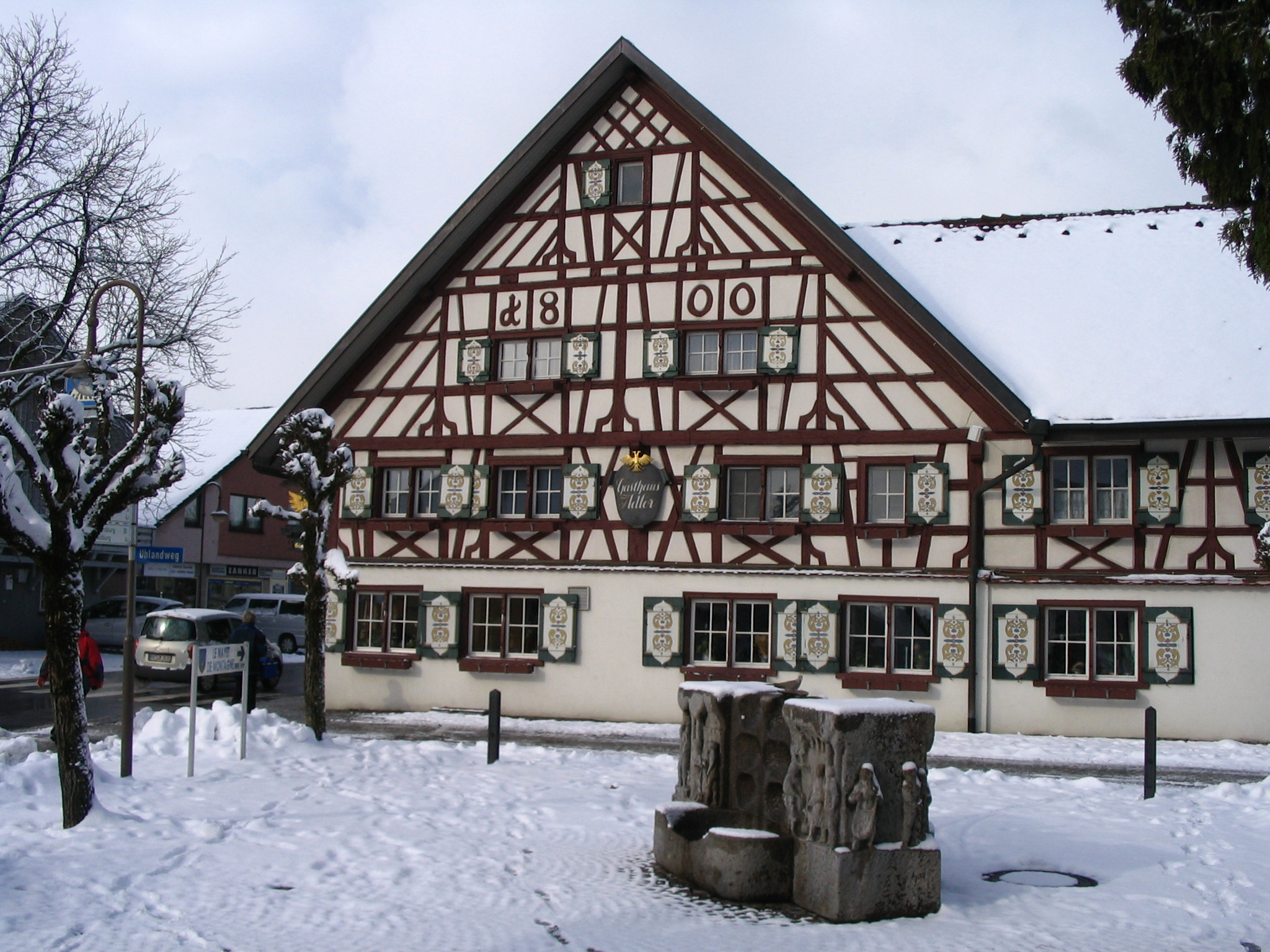 Vogt, Landkreis Ravensburg: Gasthaus Adler